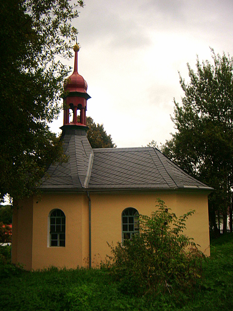 Kaple sv. Josefa, Bukovany